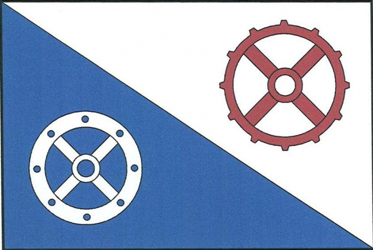 Vlajka, Radiměř, okres Svitavy